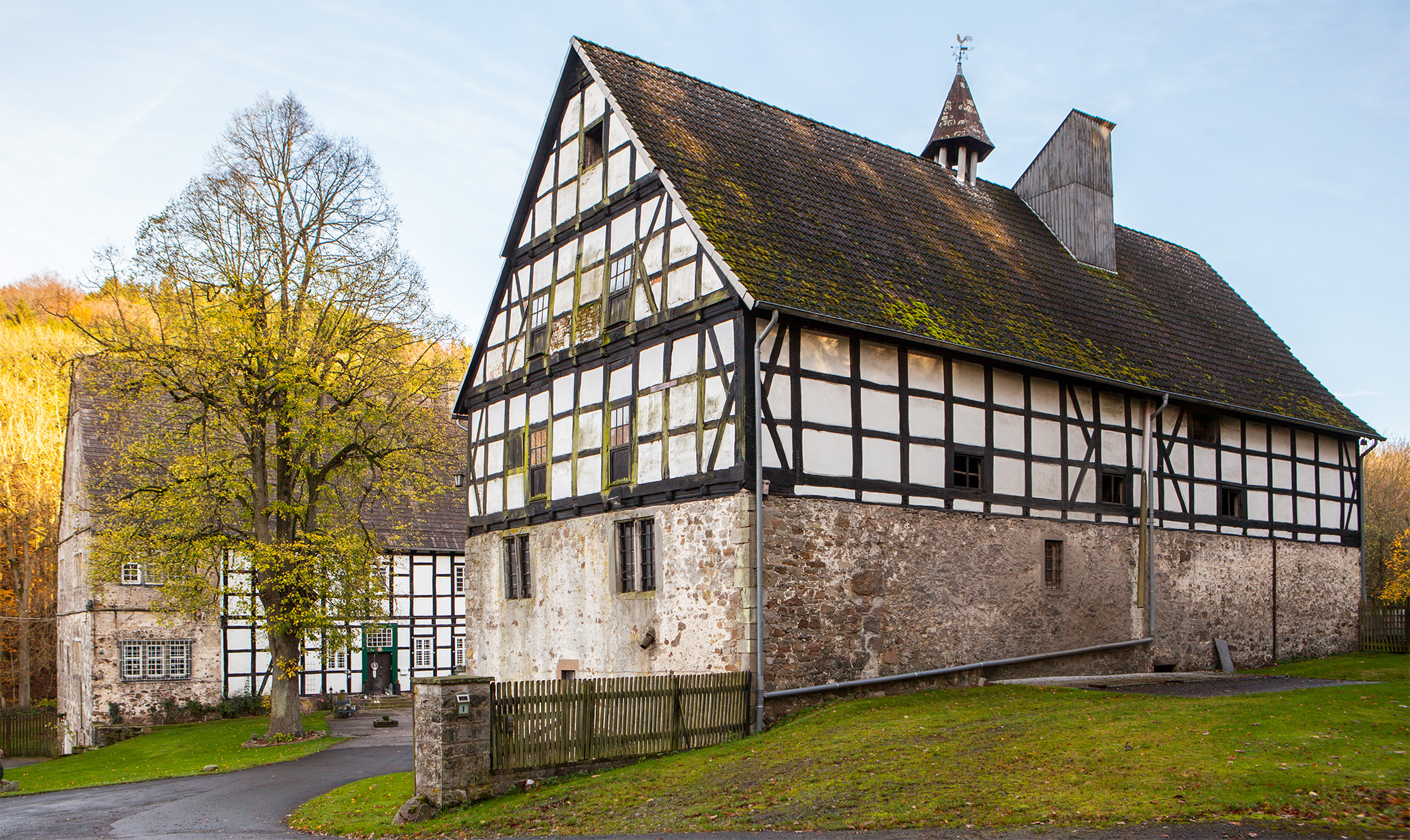 Gut Ullenhausen im Extertal, Kreis Lippe This is a photograph of an architectural monument.